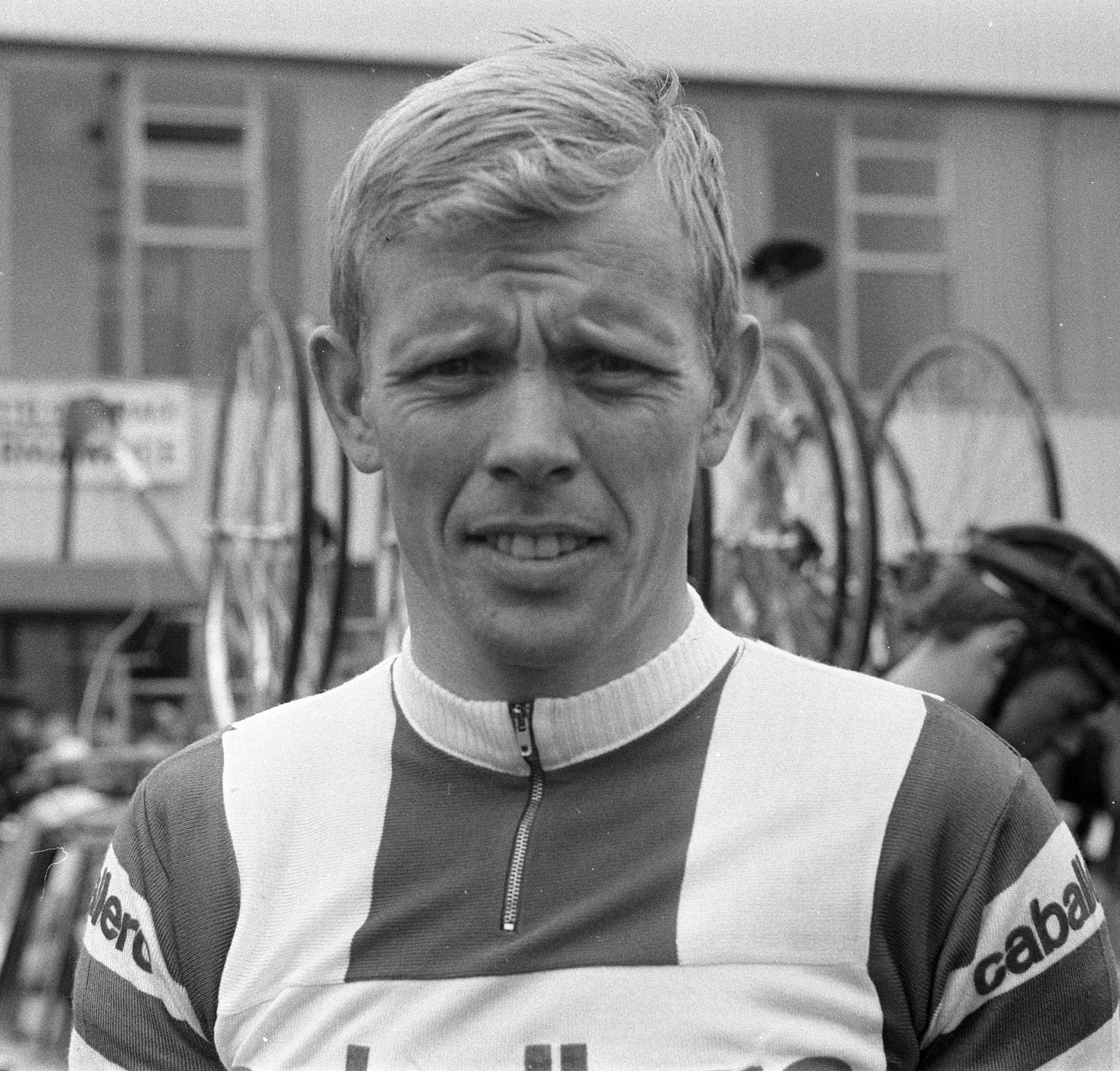 Arie den Hartog lors de l'Amstel Gold Race 1970.